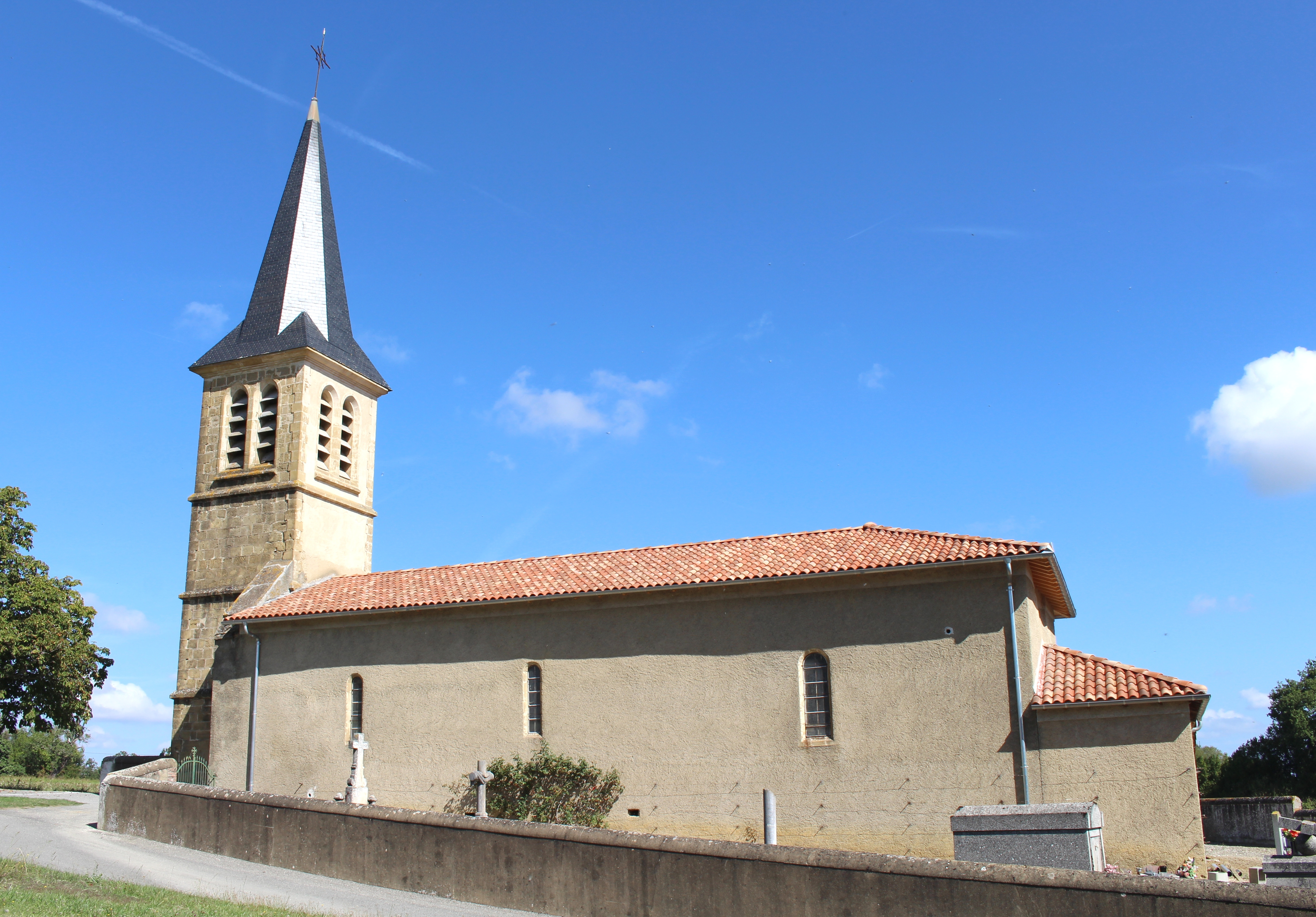 Église de l'Assomption de Lalanne (Hautes-Pyrénées)